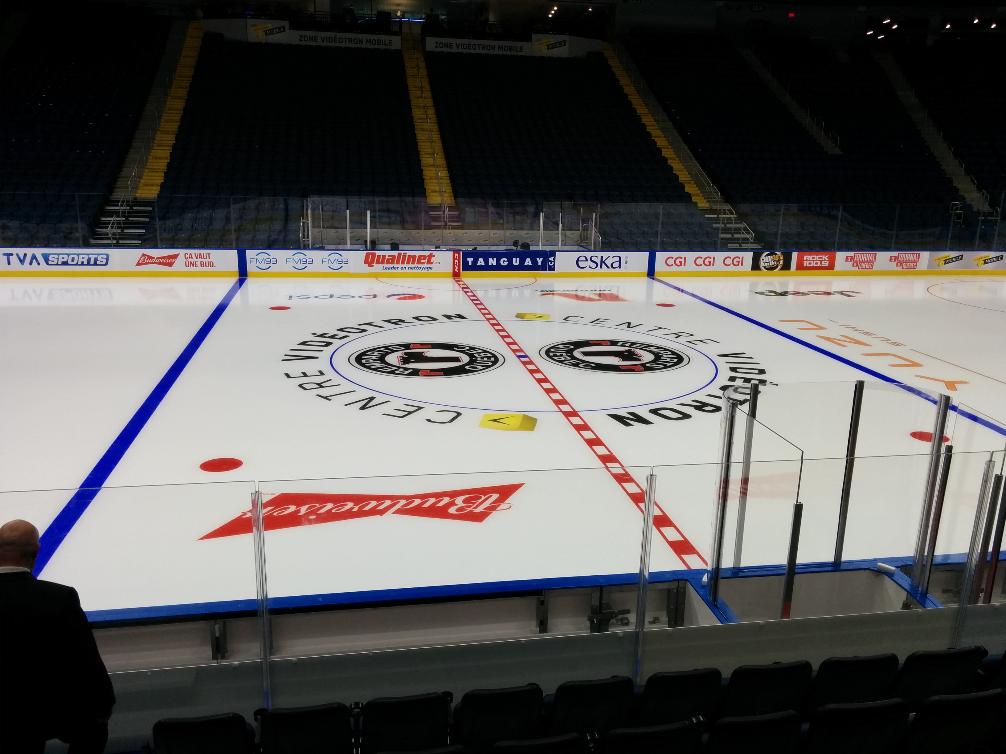 Vue de la zone centrale de la patinoire du Centre Vidéotron.